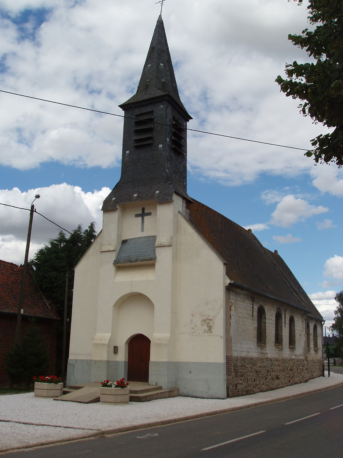 Commune française de Villers-Sir-Simon dans le département du Pas-de-Calais en France - Église